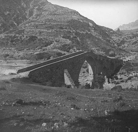 Vista general del pont de Pedret i muntanyes. Frederic Bordas i Altarriba (ca. 1890)